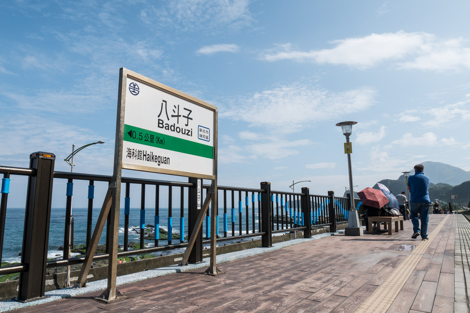 八斗子車站